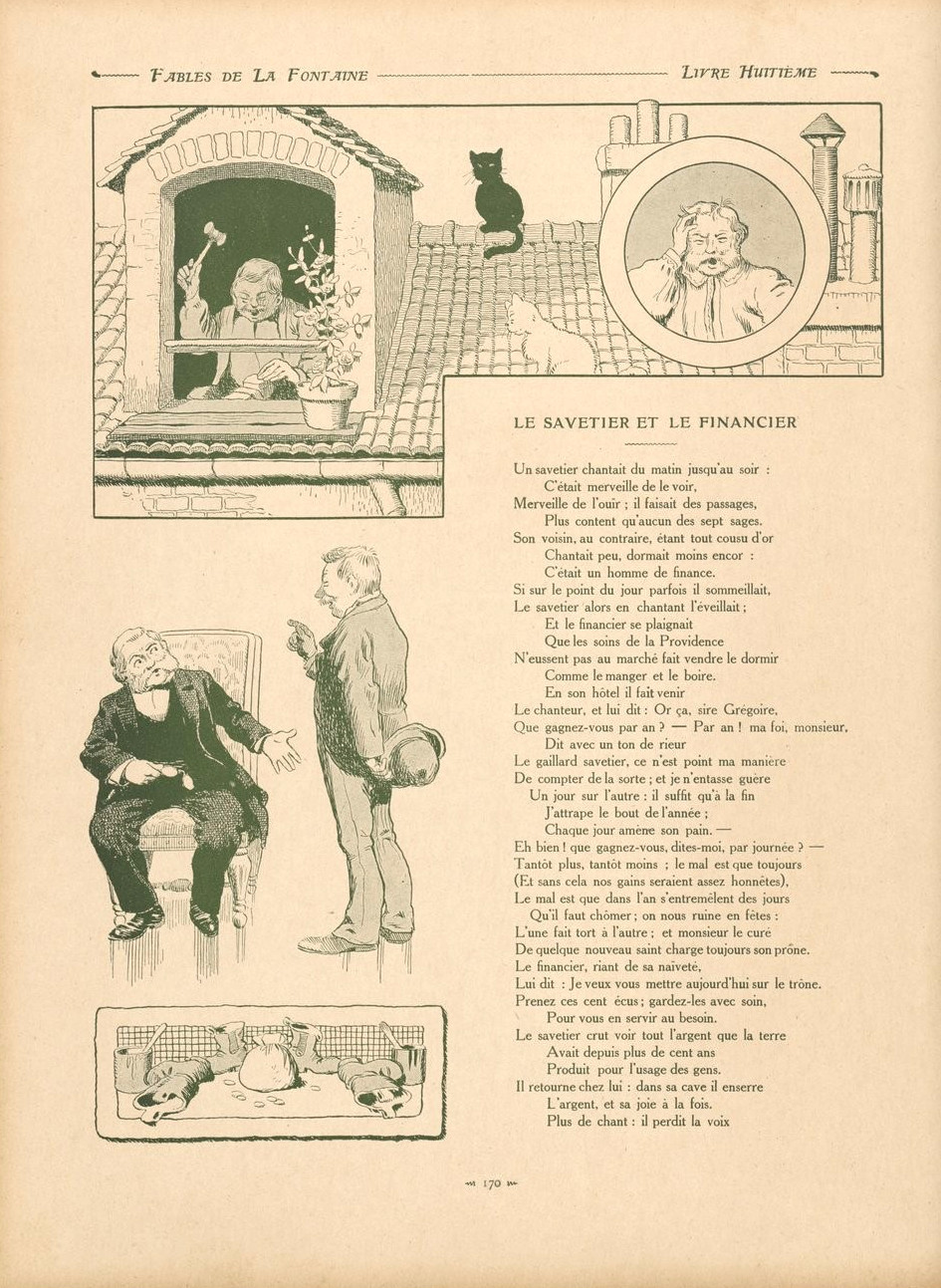 Fables de La Fontaine illustrées par Benjamin Rabier : Le savetier et le financier